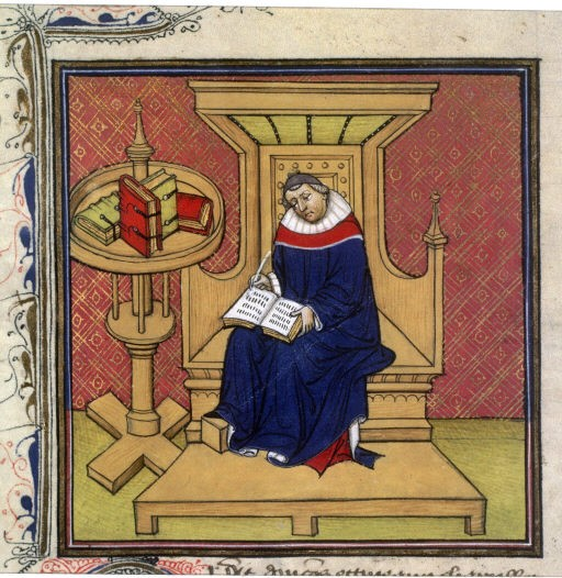 Enluminure des Grandes Chroniques de France représentant Eginhard ; ; Cote : Français 73, folio 86 v° Origine : BNF, Richelieu, Manuscrits Français, Grandes chroniques de France, Paris, XIVe / XVe siècles